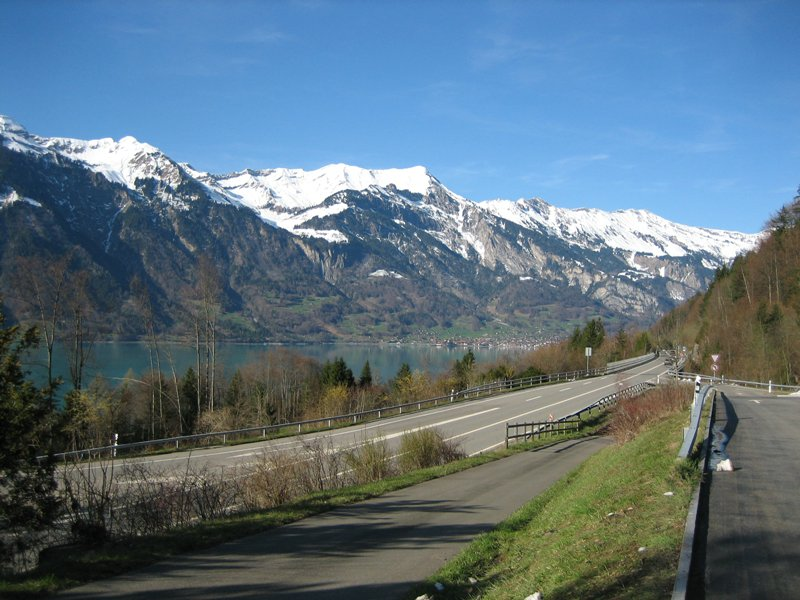 Beschreibung: Autobahn A8 bei Iseltwald